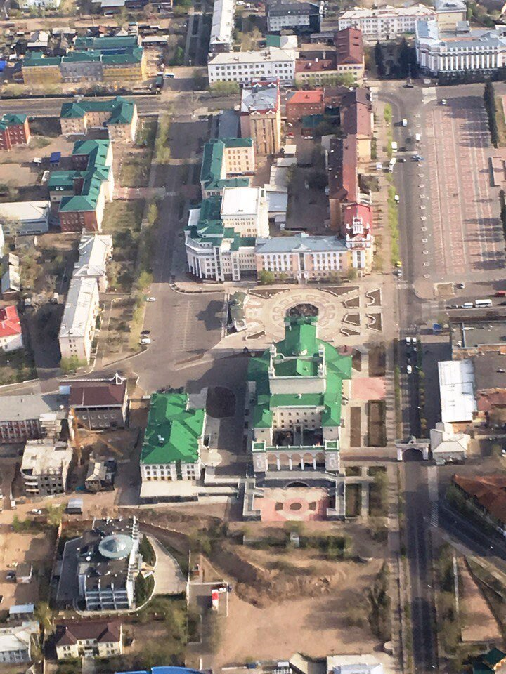 Center of the Soviet district of Ulan-Ude from a bird's eye view